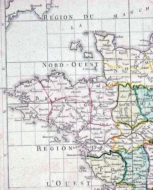 Extrait de la "Carte de France divisée suivant le plan proposé à l’Assemblée nationale", premières propositions de découpage préalables à la division de la France en départements. Découpé de File:CarteComiteConstitution1789.jpg